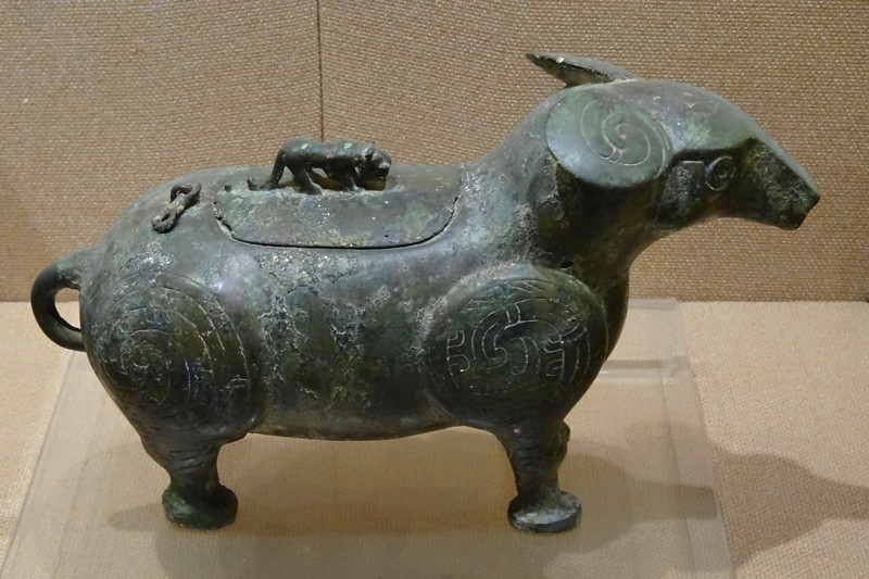 井姬盂鏙，1974年宝鸡茹家庄二号墓出土，宝鸡青铜器博物院藏。